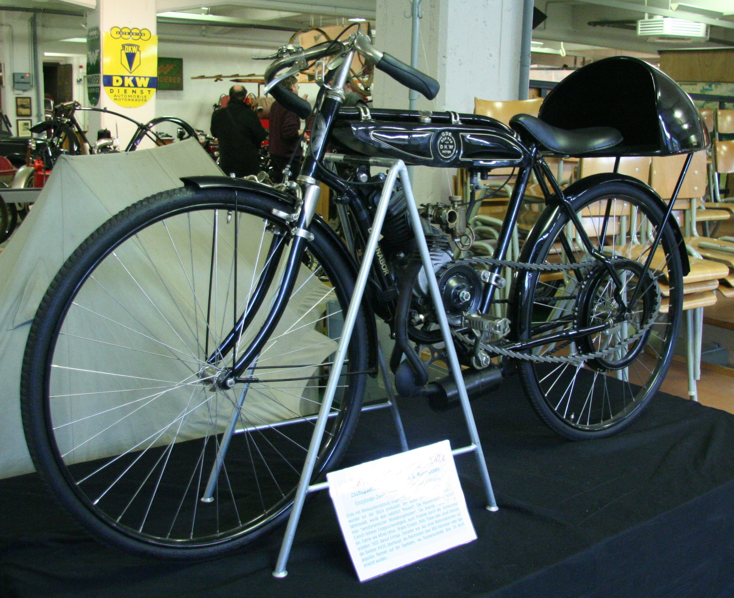 erste mit Werksunterstützung eingesetzte DKW Rennmaschine, Einzylinder-Zweitaktmotor mit ca. 4 PS aus 150 cm³, Baujahr 1922, im Museum für sächsische Fahrzeuge in Chemnitz.